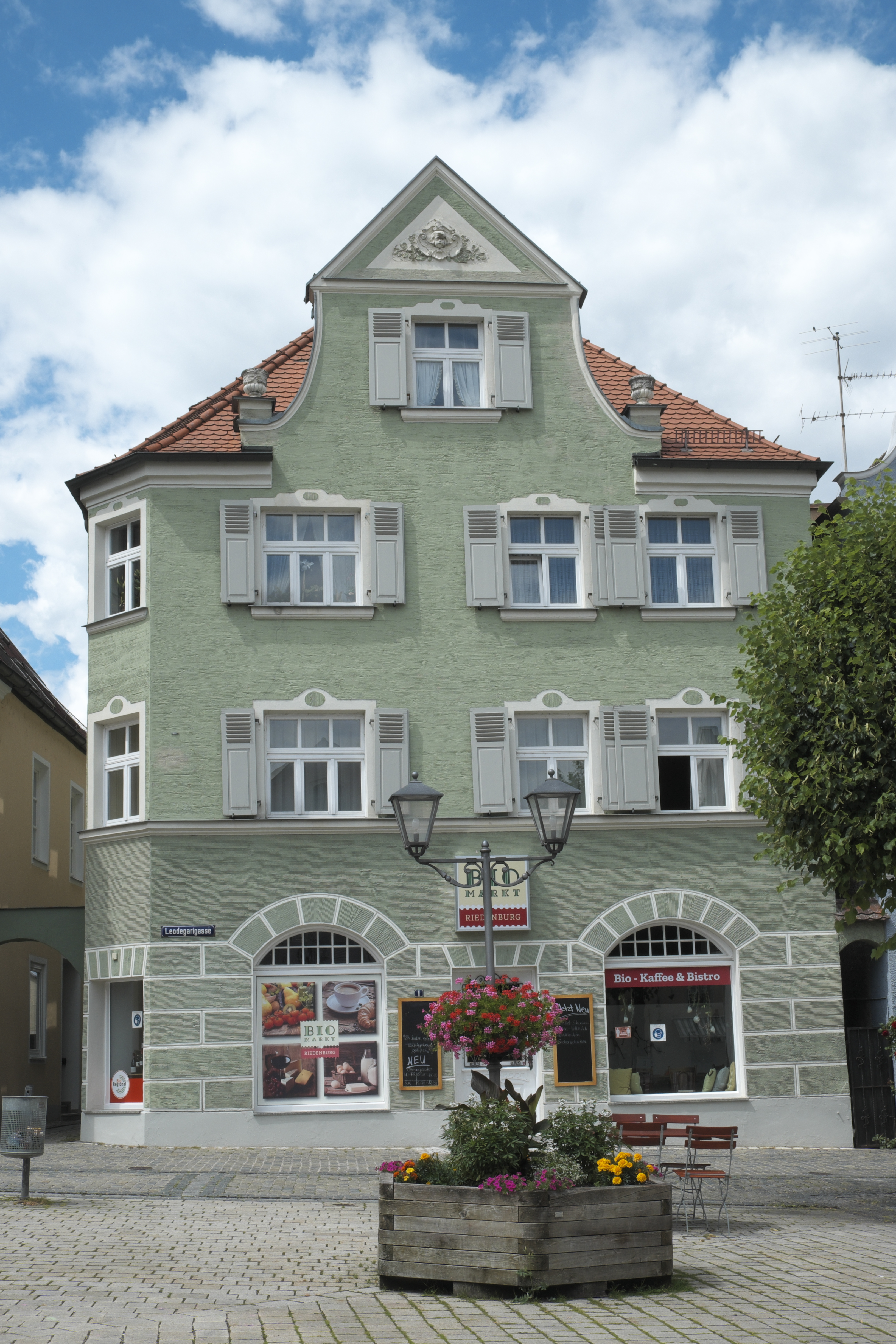 Wohn- und Geschäftshaus, Leodegarigasse 1, in Riedenburg im niederbayerischen Landkreis Kelheim (Bayern/Deutschland)